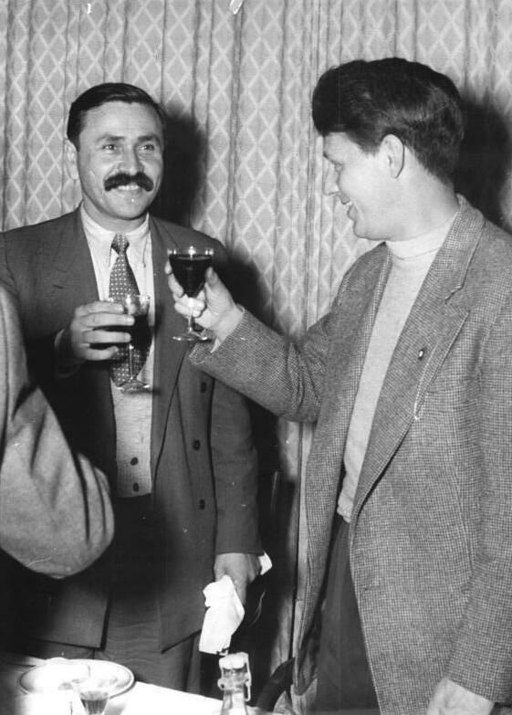 Zentralbild Weiß 1.10.1954 Abschiedsempfang für ausländische Schriftsteller in Berlin Am 30.9.1954 fand im Hotel Johannishof, Berlin, ein Abschiedsempfang für polnische, tschechoslowakiche, französische und albanische Schriftsteller statt, die sich längere Zeit in der Deutschen Demokratischen Republik aufgehalten hatten. UBz: Stephan Hermlin (rechts) und Zihni Sako, Albanien.